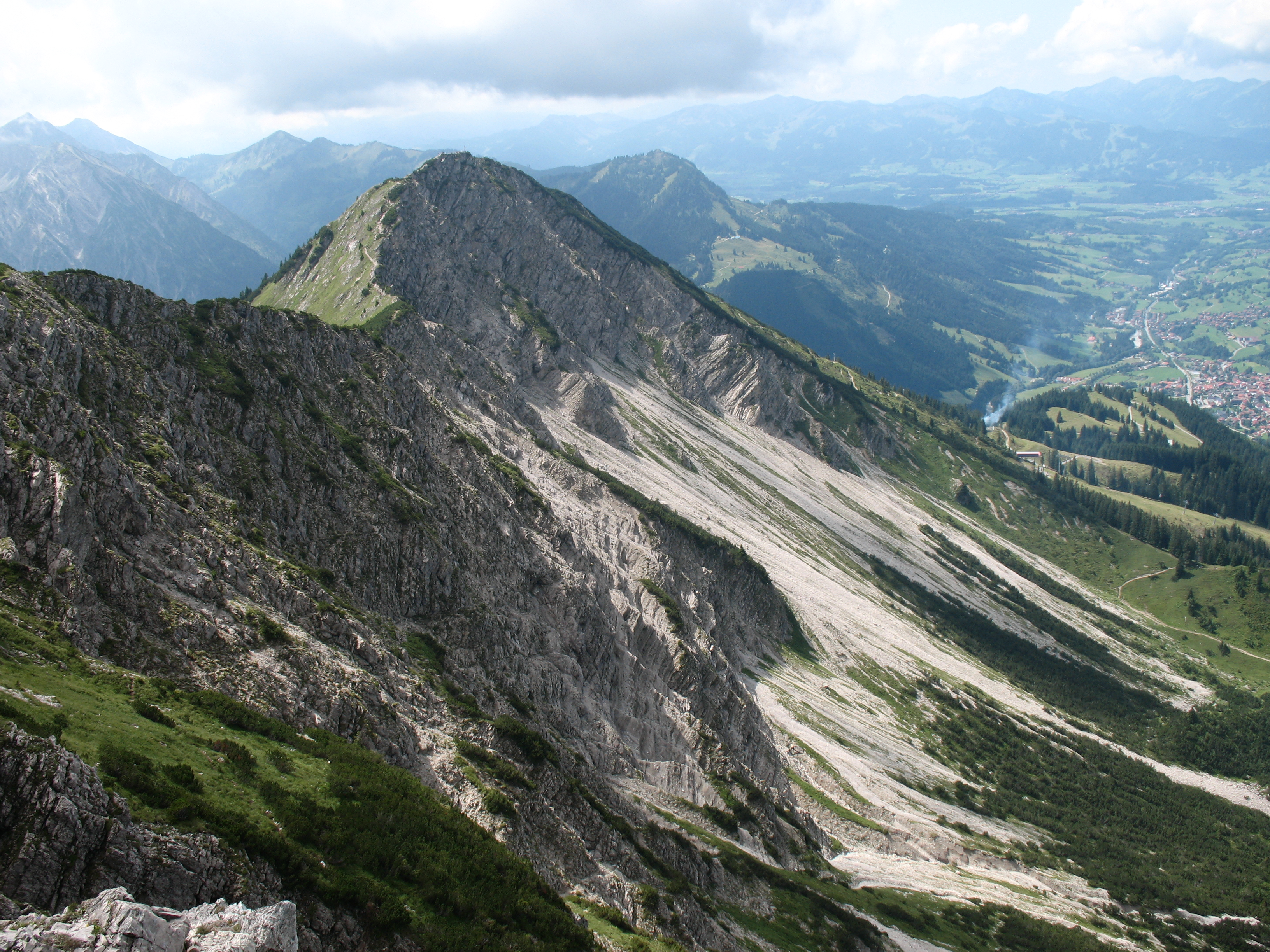 Blick auf die schrofige Nordflanke zwischen Kühgundkopf (1907 m) und Iseler (1876 m), durch die der Salewa-Klettersteig verläuft.